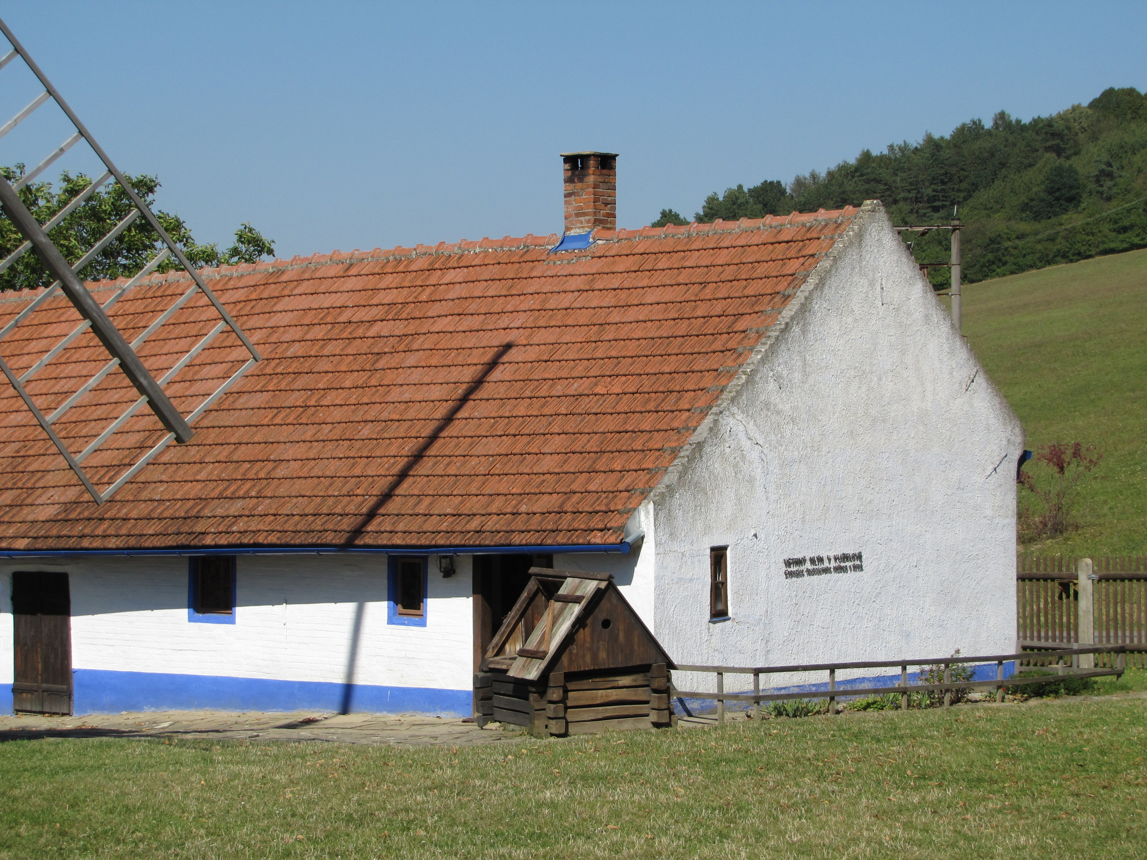 Přilehlé stavení s muzejní expozicí u větrného mlýna v Kuželově